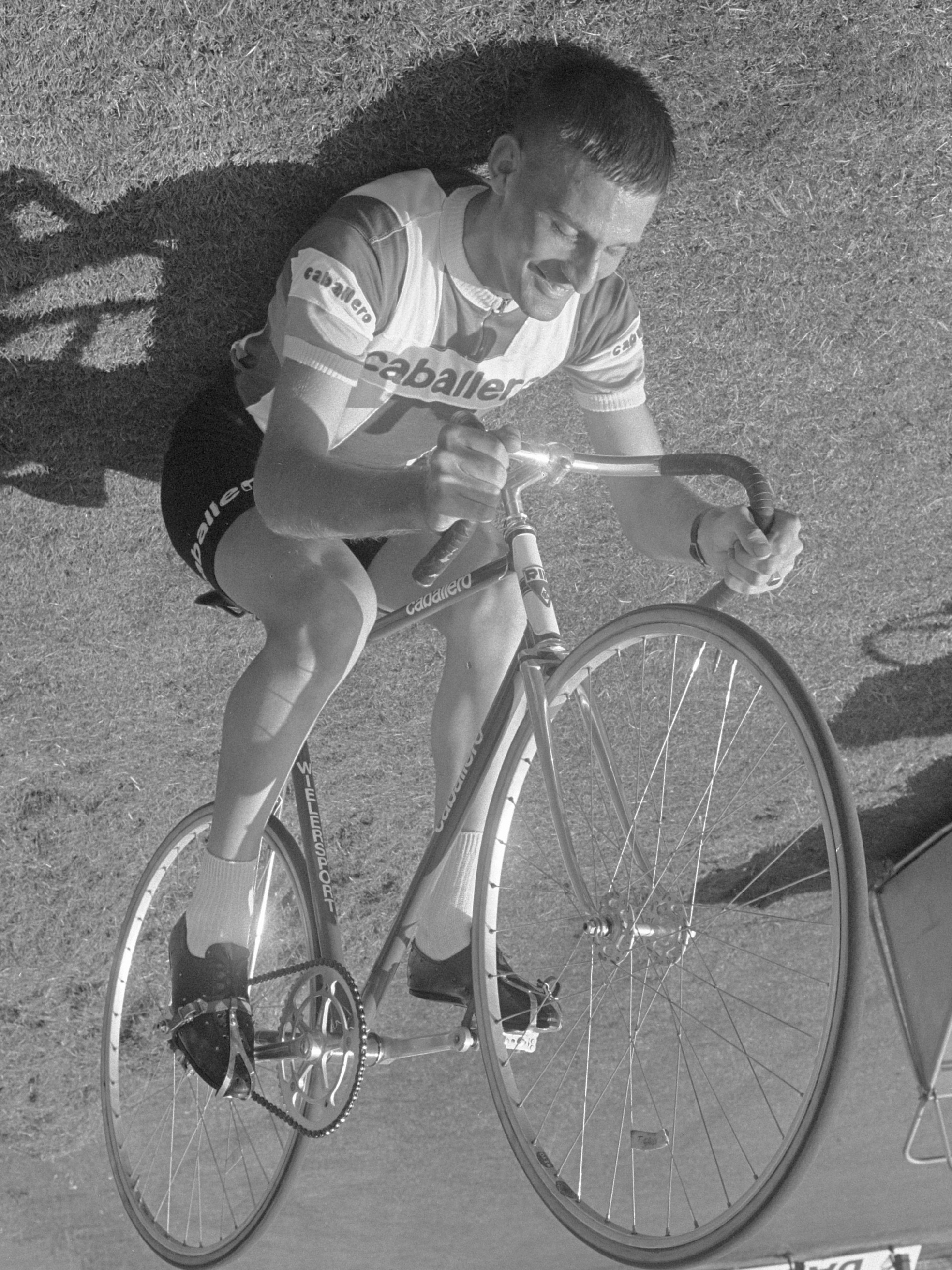 Training Wielerkampioenschappen op de baan. Tiemen Groen op zijn kop 31 juli 1967